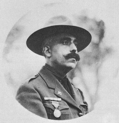 Juan Antonio Dimas, primer Jefe Scout Nacional de los Exploradores de España (1932)